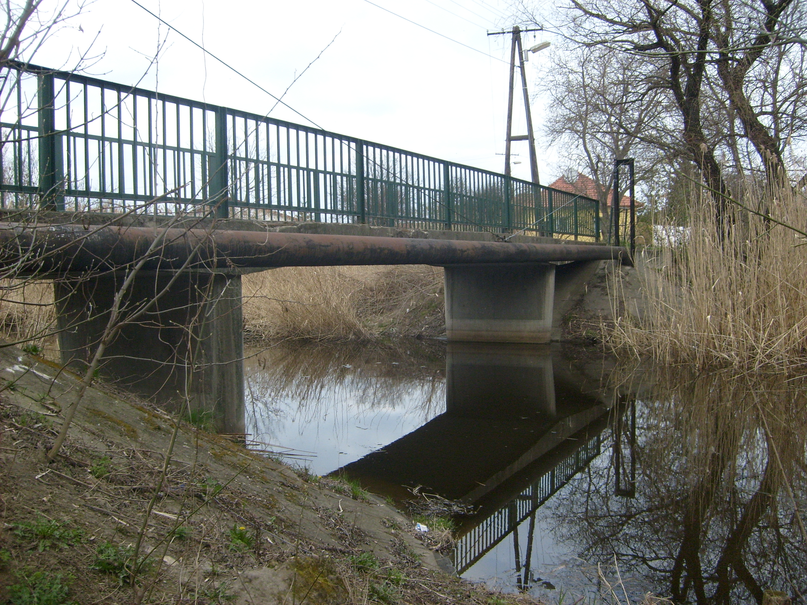 Békés, Jámbor utcai híd oldalról